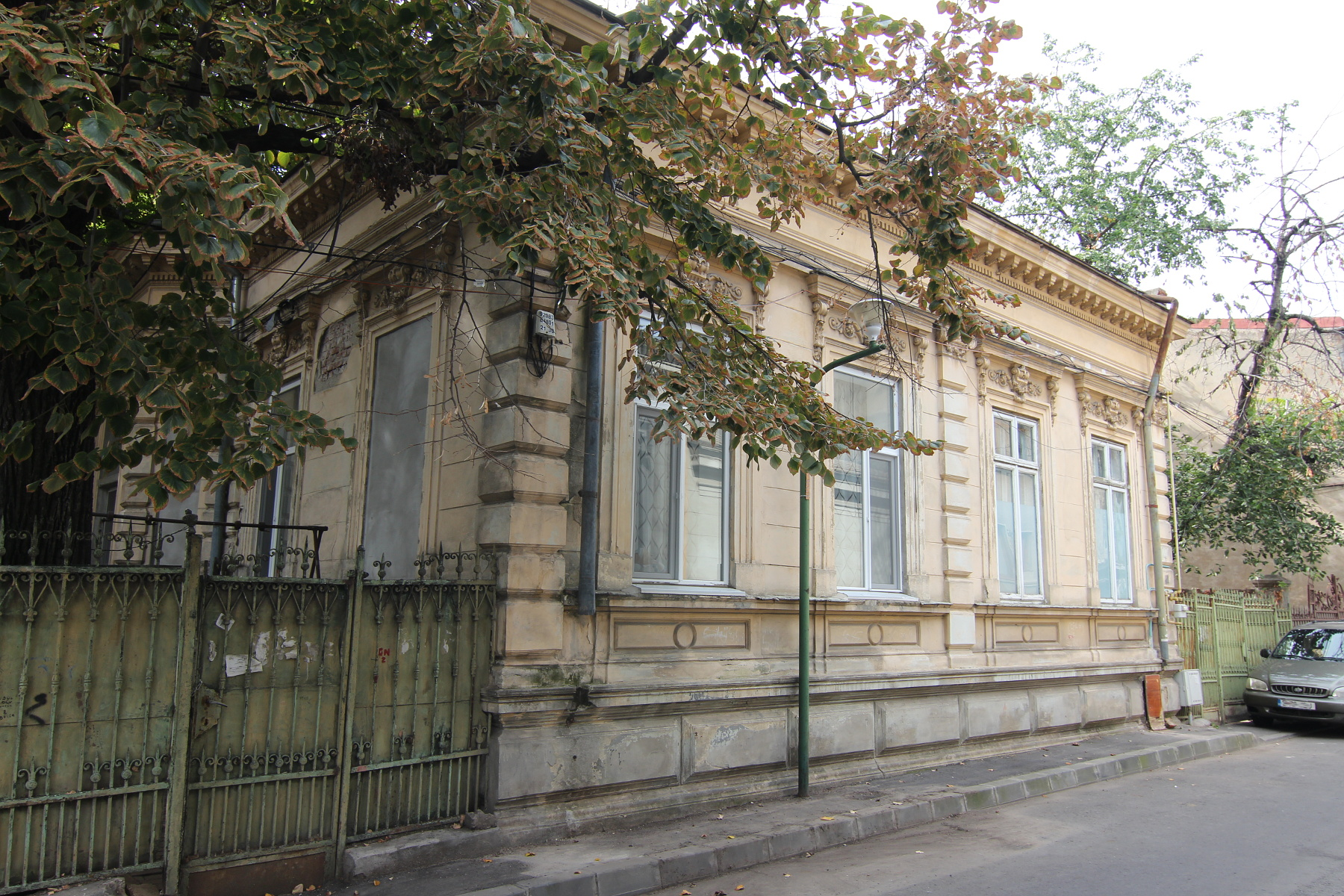 Casă pe Stelea Spătarul